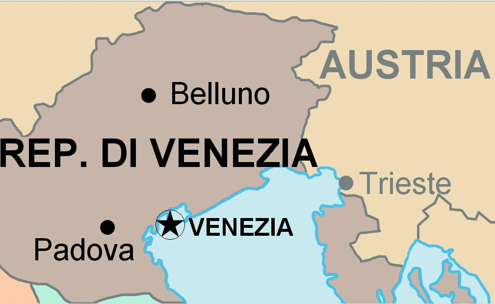 Dettaglio estrapolato del File:Italia 1494-it.svg caricato su Commons da utente "Mess" in data 15/03/2013